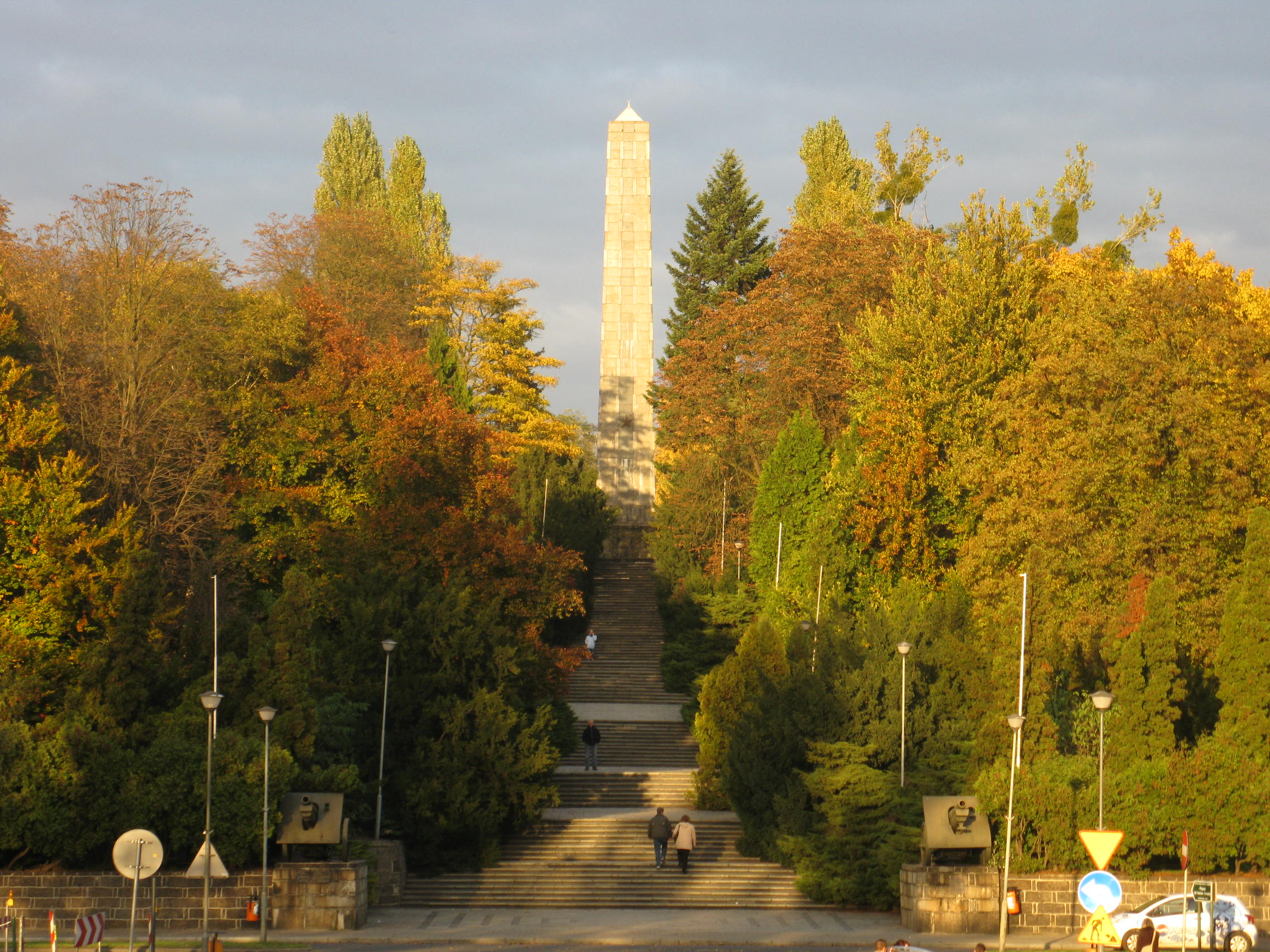 Wejście główne na Cytadelę